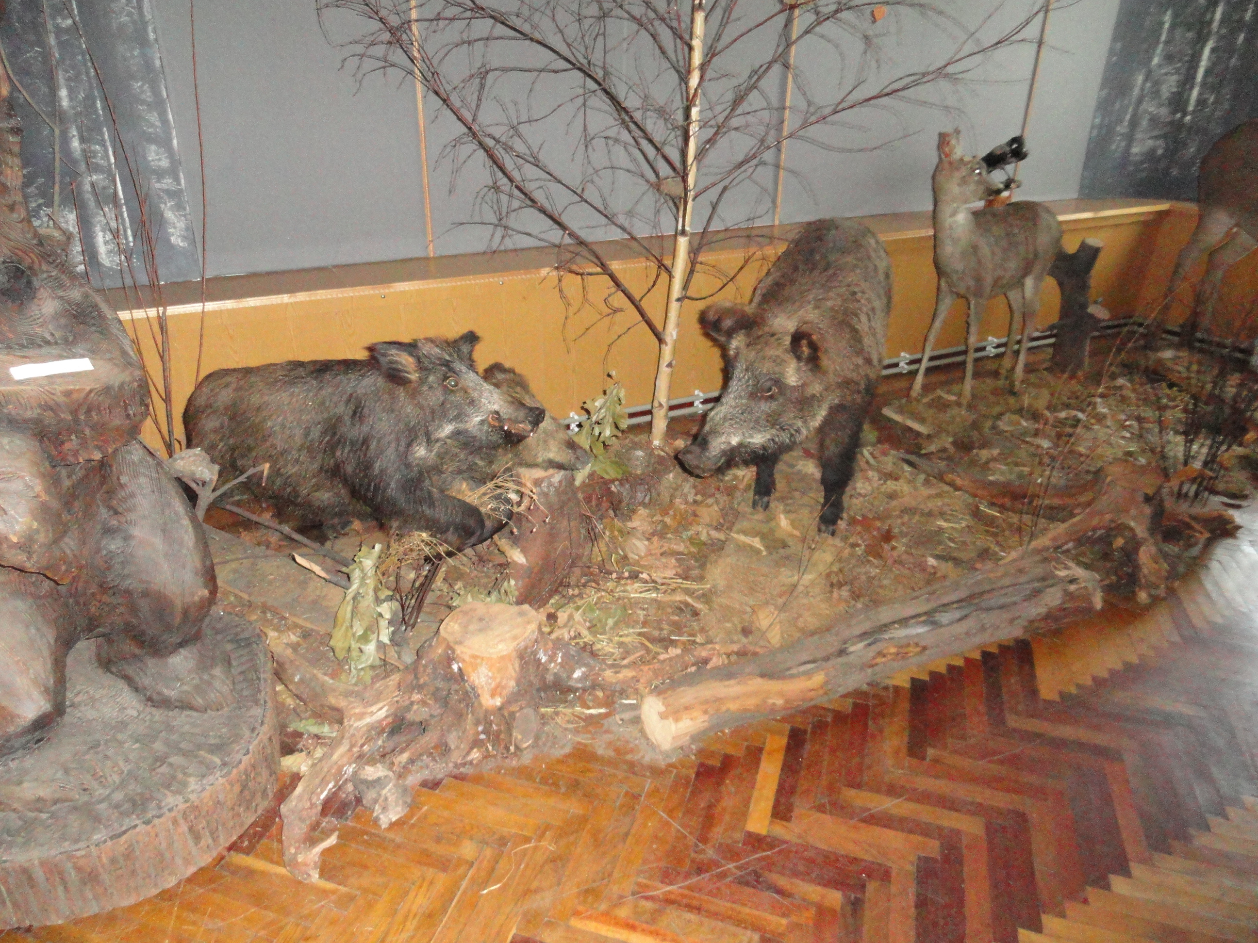 колекція чучел тварин. Історико-краєзнавчий музей культури та побуту Бойківщини (Цінева)